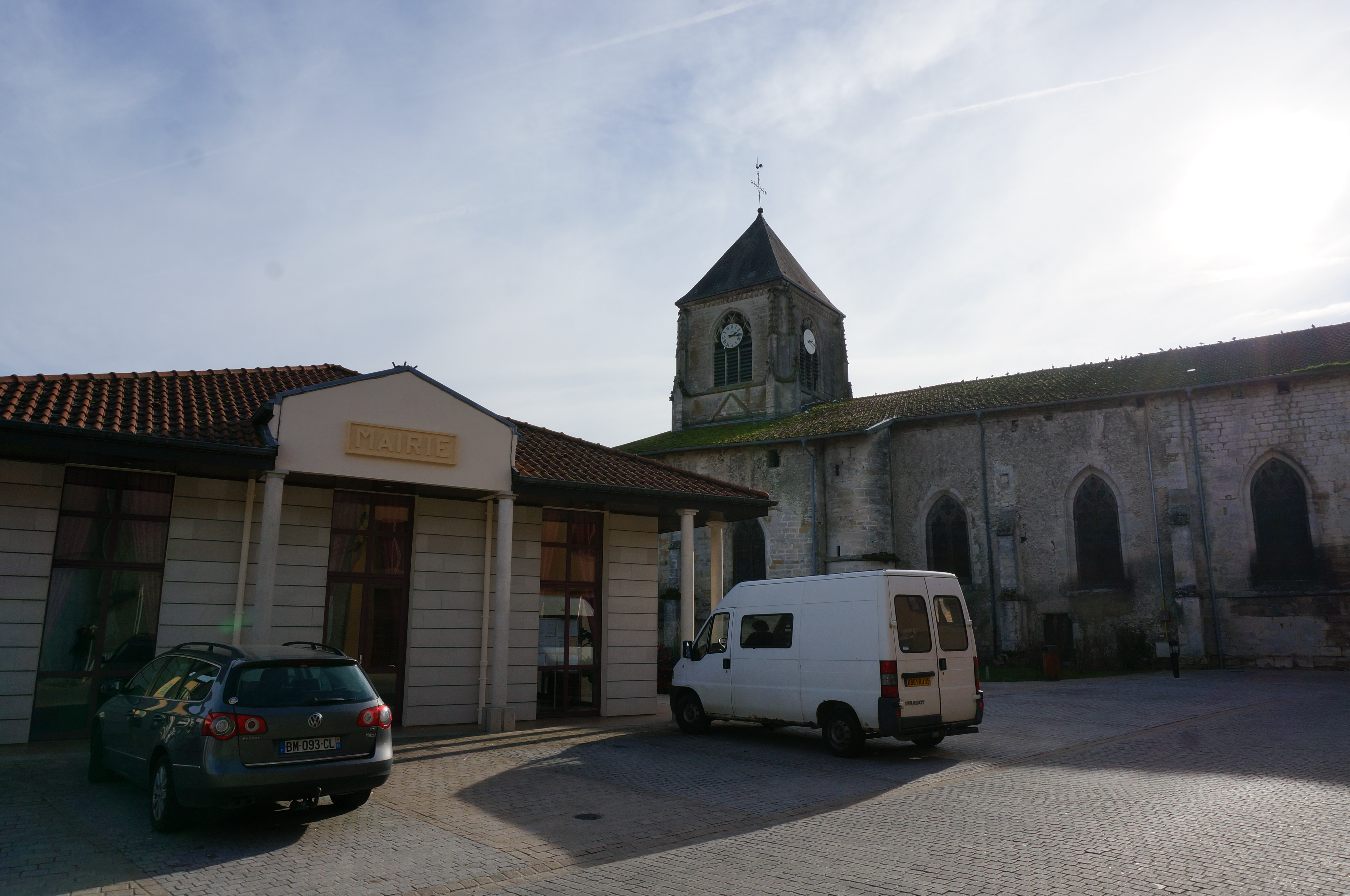 vue de l'église de Longeville-en-Barrois.